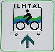 Titel: Signet des Ilmtal-Radwegs